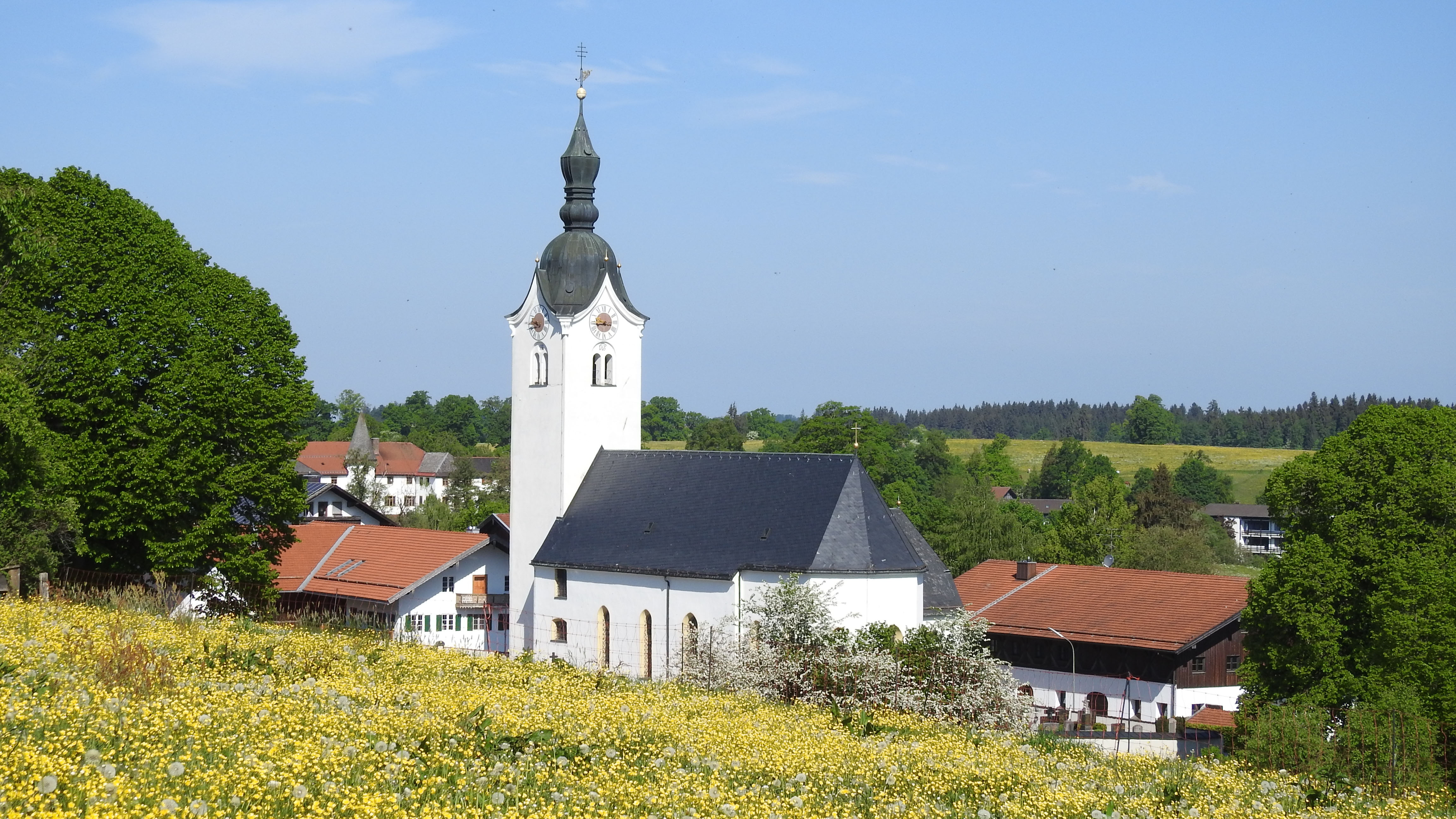 Kirche von Reichersbeuern von Südosten